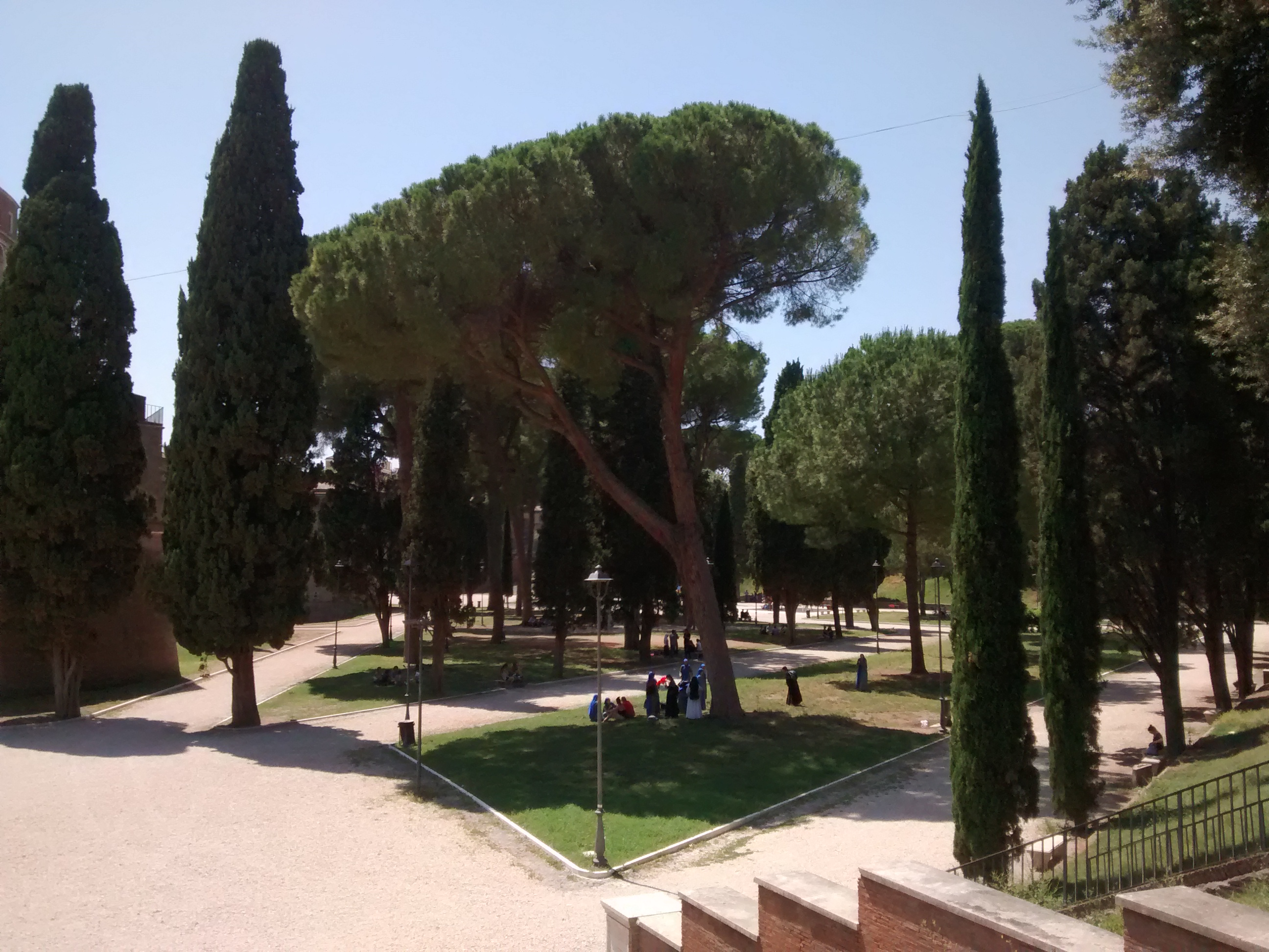 Parco Adriano, Rome